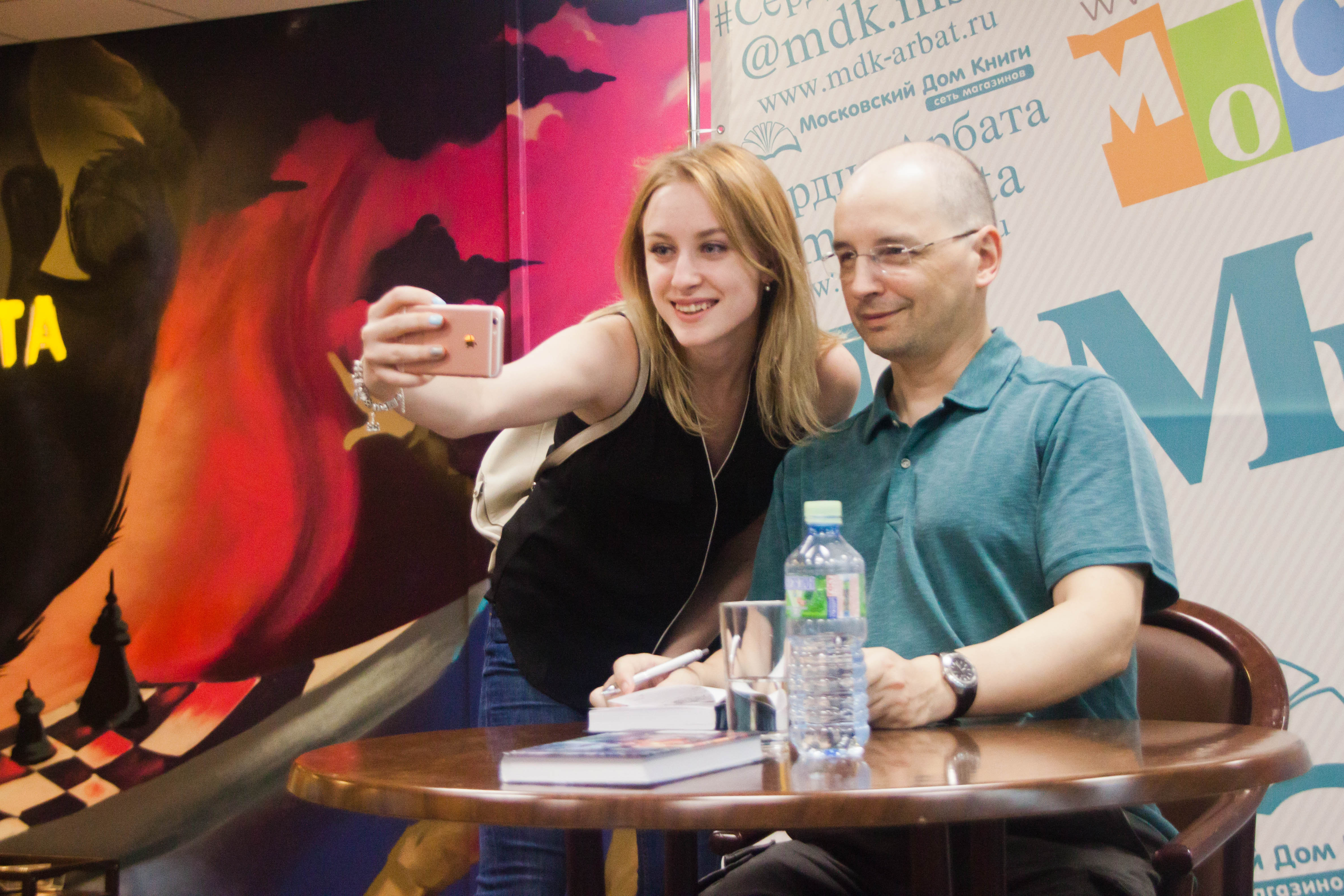 Писатель-фантаст Ник Перумов в Московском Доме книги на Новом Арбате